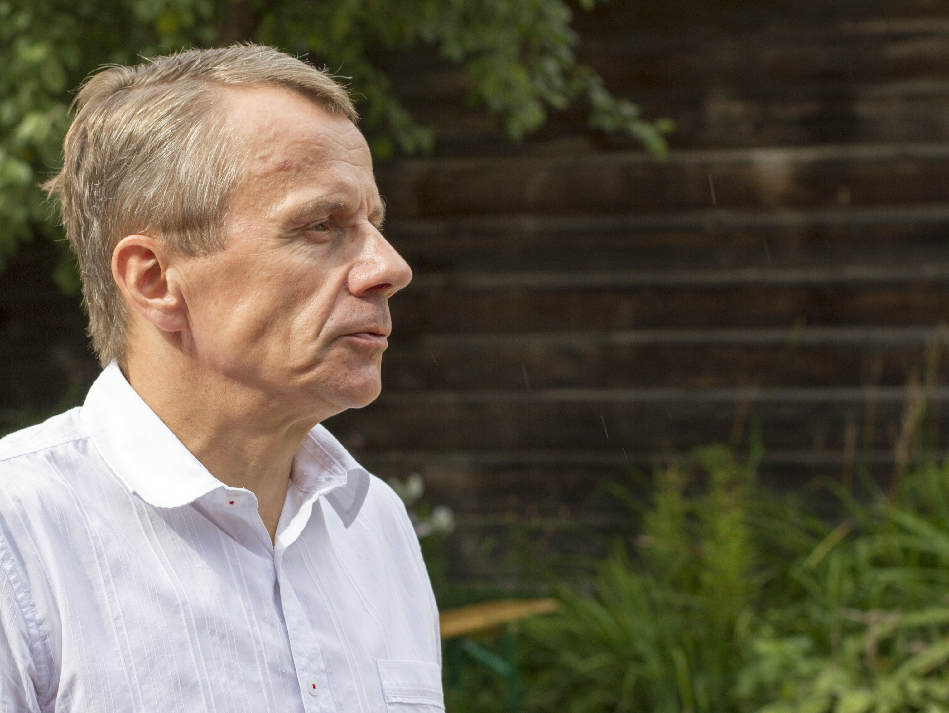 Arvamusfestival 2014